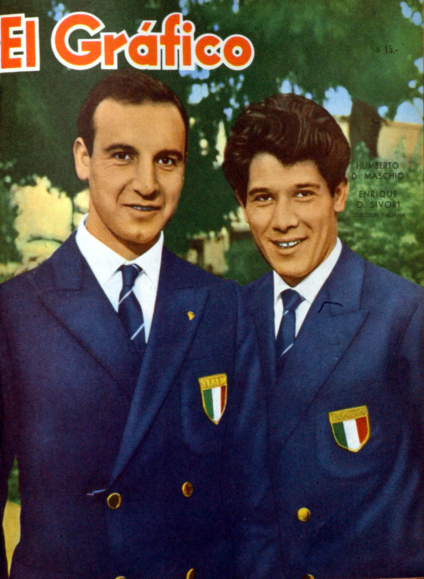 El Grafico del 13 de Junio de 1962. Edicion 2227